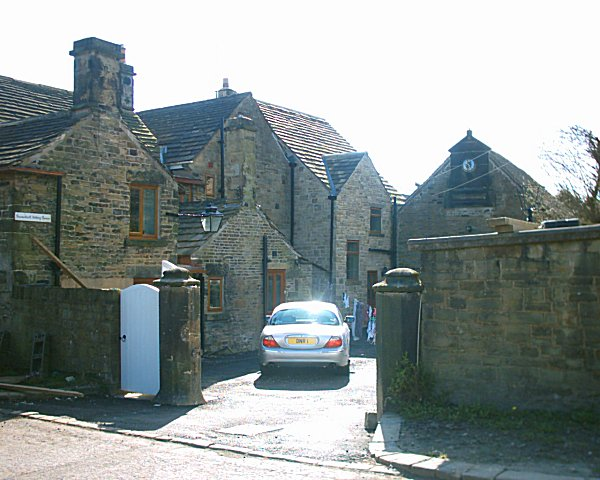 Beauchief House, Sheffield.